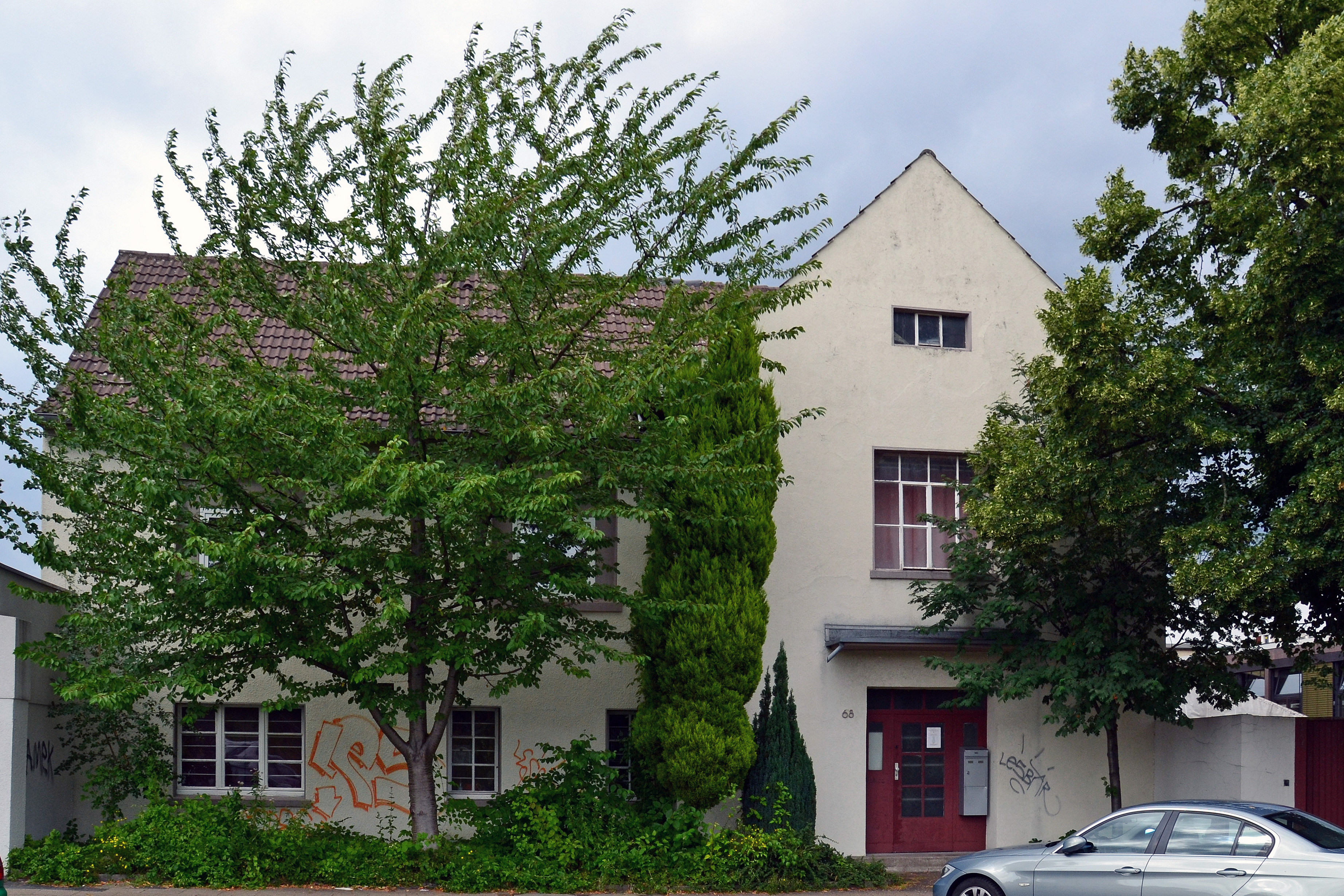 Markt- und Schaustellermuseum in Essen-Stadtkern, Hachestraße